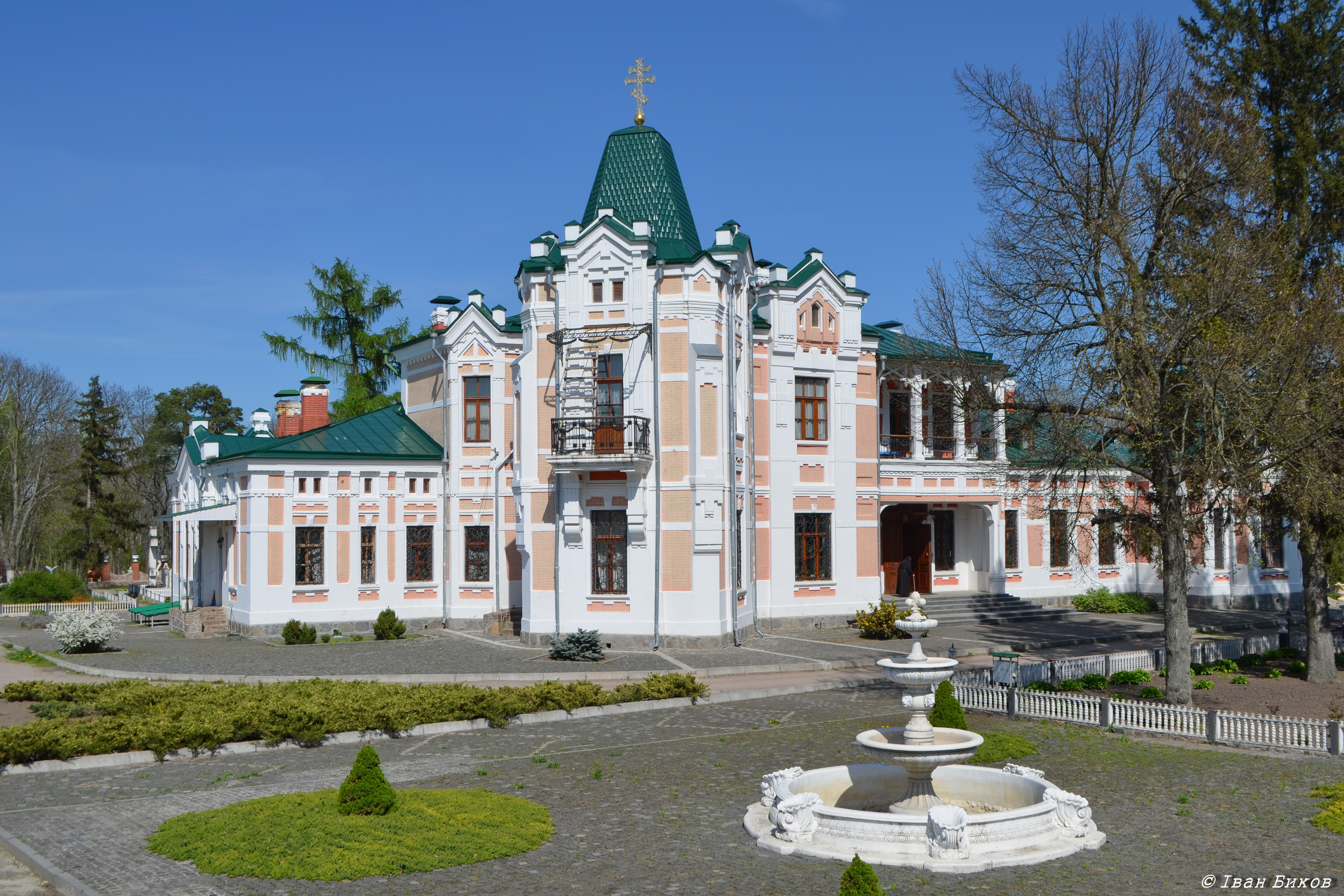 Томашівка. Садиба Хаєцьких. 1903-11 рр. Архітектор - Валеріан Куликівський